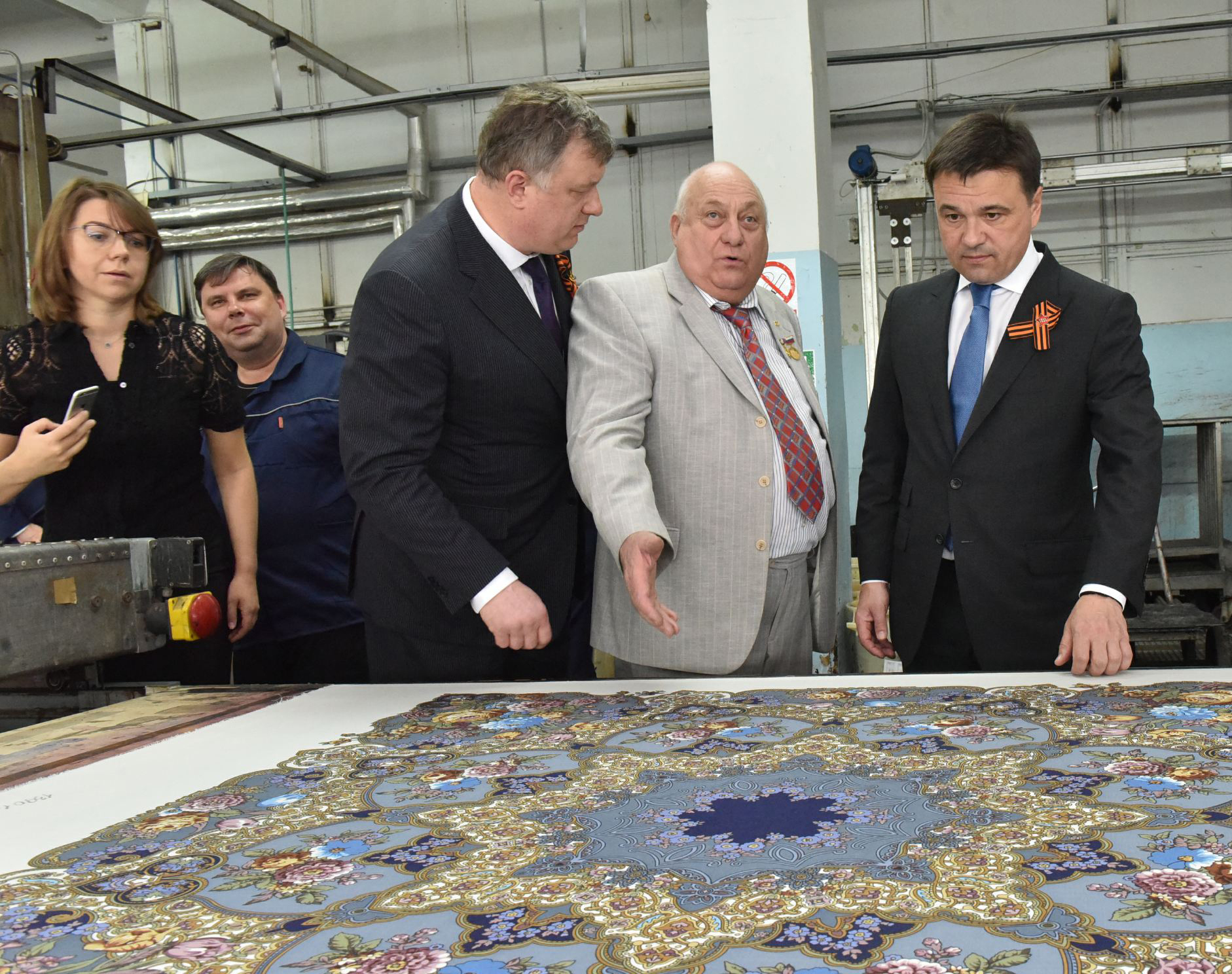 В. Стулов (в центре), глава Павлово-Посадского района О. Соковиков и губернатор Московской области А. Воробьев во время посещения ОАО "Павловопосадская платочная мануфактура", 2016 г.